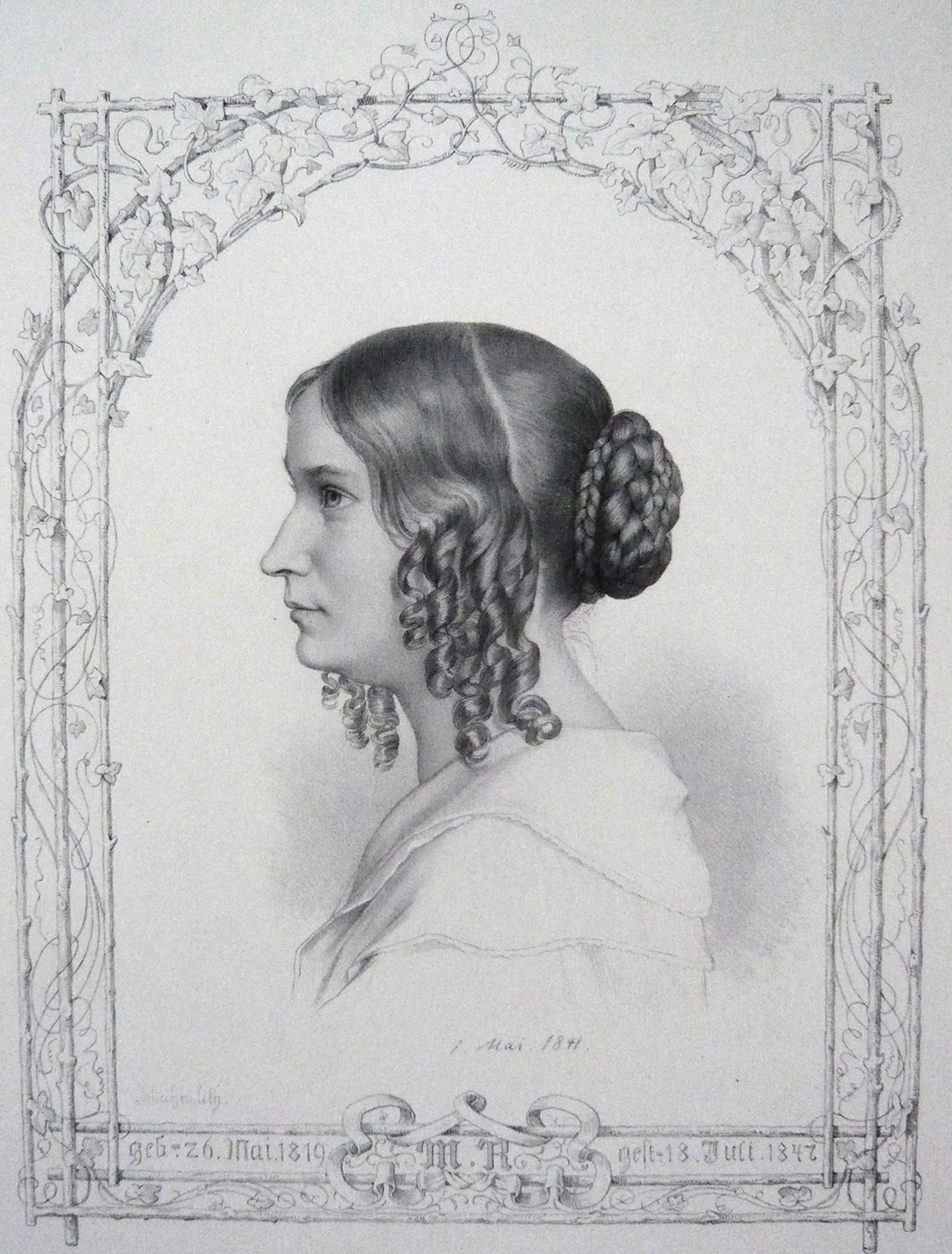 Marie Hand (* 26. Mai 1819; † 18. Juli 1847), 3. Frau von Ernst Rietschel, zur Hochzeit 1. Mai 1841, Lithografie